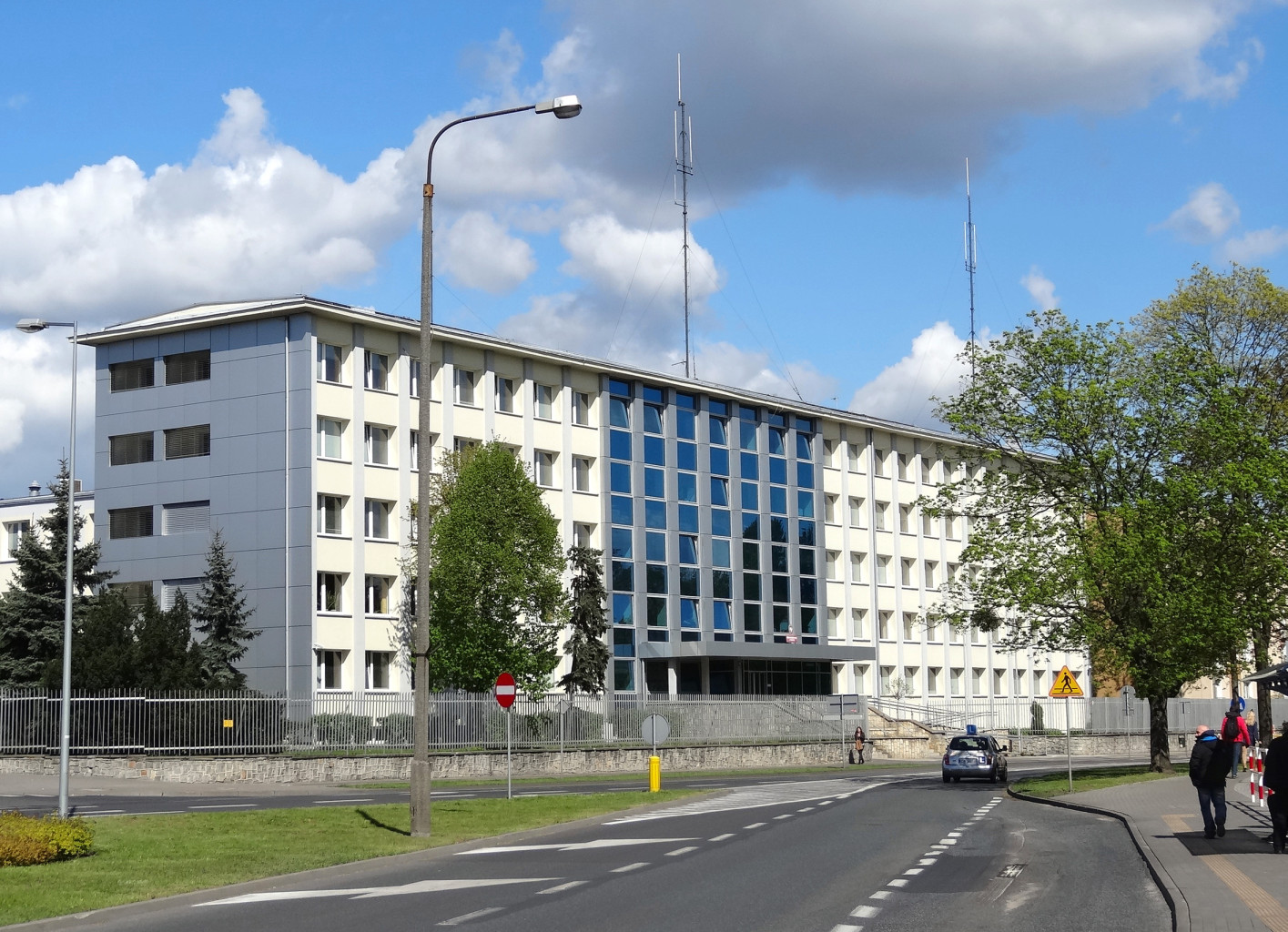 Wojewódzka Komenda Policji w Bydgoszczy przy ul. Powstańców Wielkopolskich